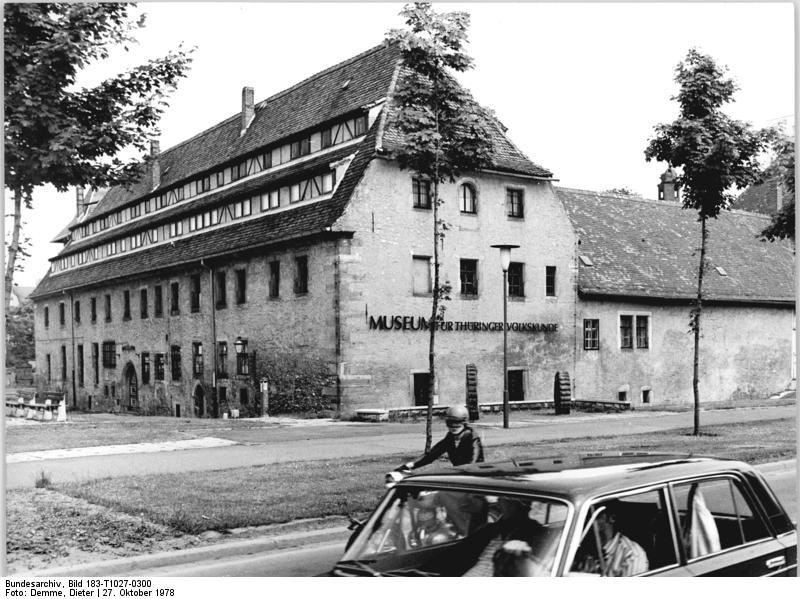 Erfurt, Juri-Gargarin-Ring, Museum für Thüringer Volkskunde ADN-ZB Demme 27.10.1978 Erfurt: Das Volkskunde-Museum am Juri-Gagarin-Ring. In diesem Gebäude aus den 16. Jahrhundert sind seltene Zeugnisse aus der Geschichte Thüringens zu sehen.